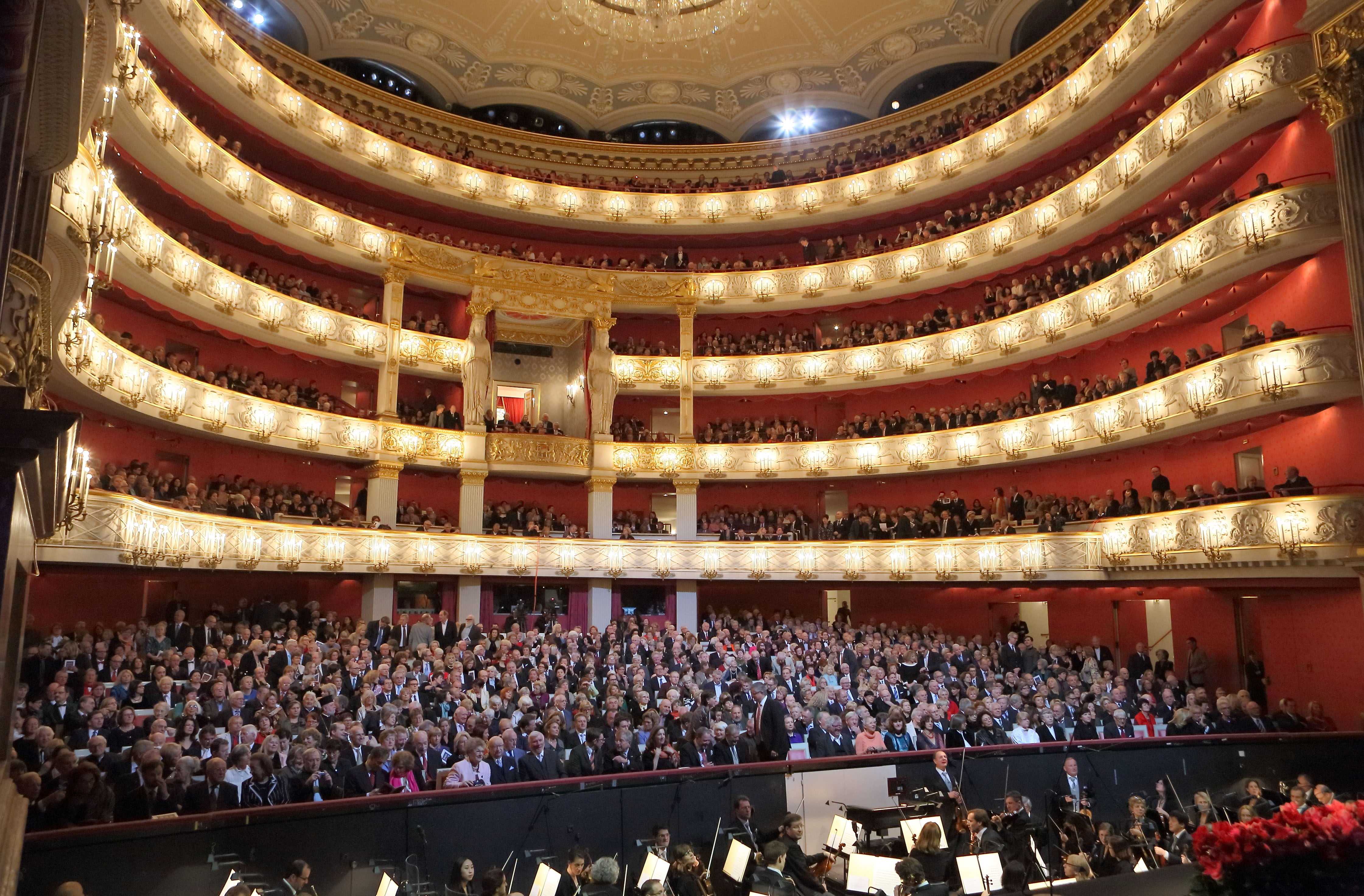 Der Verein "Freunde des Nationaltheaters München e.V." veranstaltet jedes Jahr für seine Mitglieder ein Konzert im Nationaltheater München. Im Bild der Zuschauerraum des Nationaltheaters bei der Veranstaltung 2013. Es spielte das Bayerische Staatsorchester.